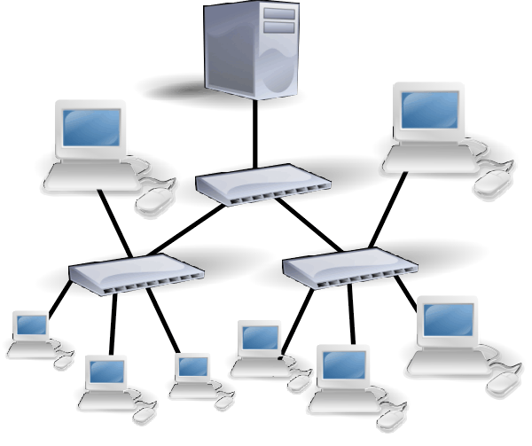 Debuxo realizado a partir de e